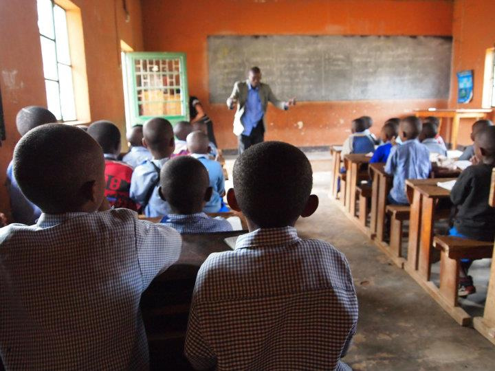 Carrie Antal/USAID